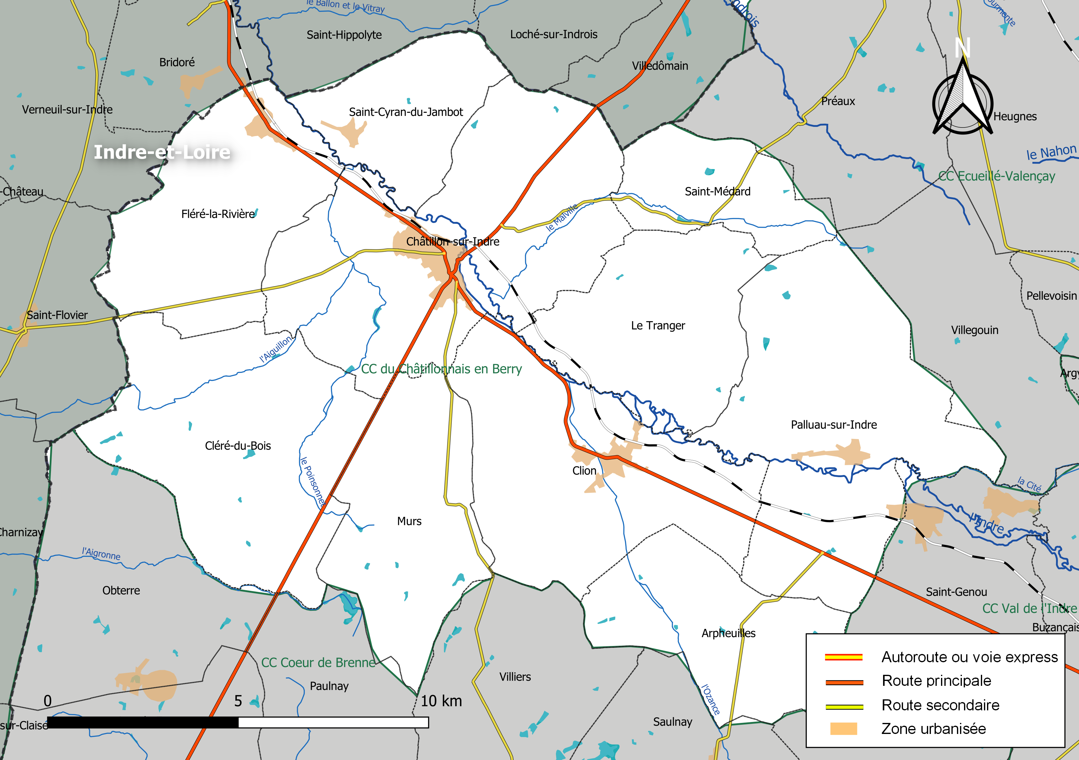 Carte de la communauté de communes du Châtillonnais en Berry, département de l'Indre, France. Composition au 1er janvier 2019.